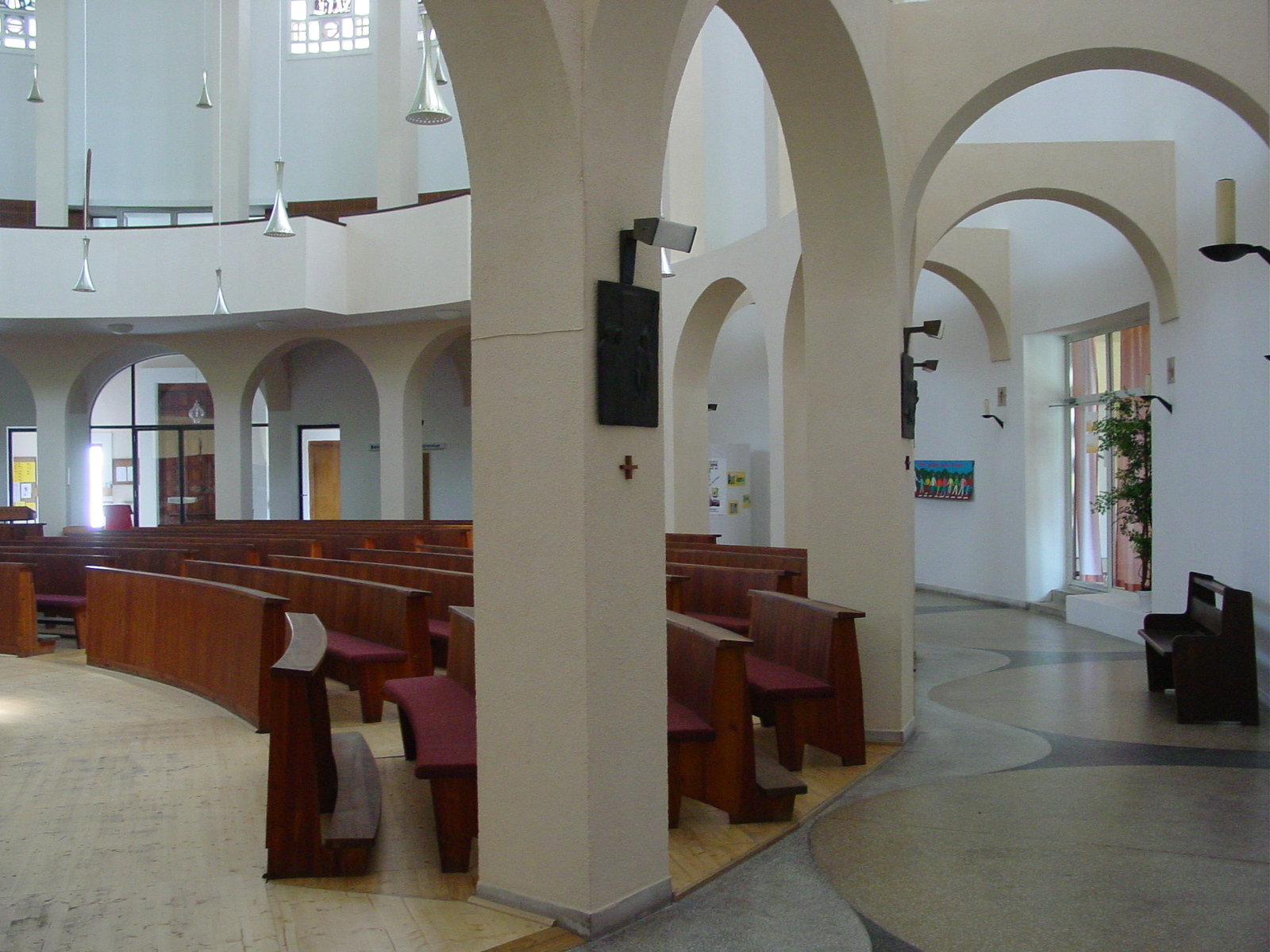 Rundgang in der Pfarrkirche Liesing mit Säulen und Kreuzwegbildern von Schneider-Manzell